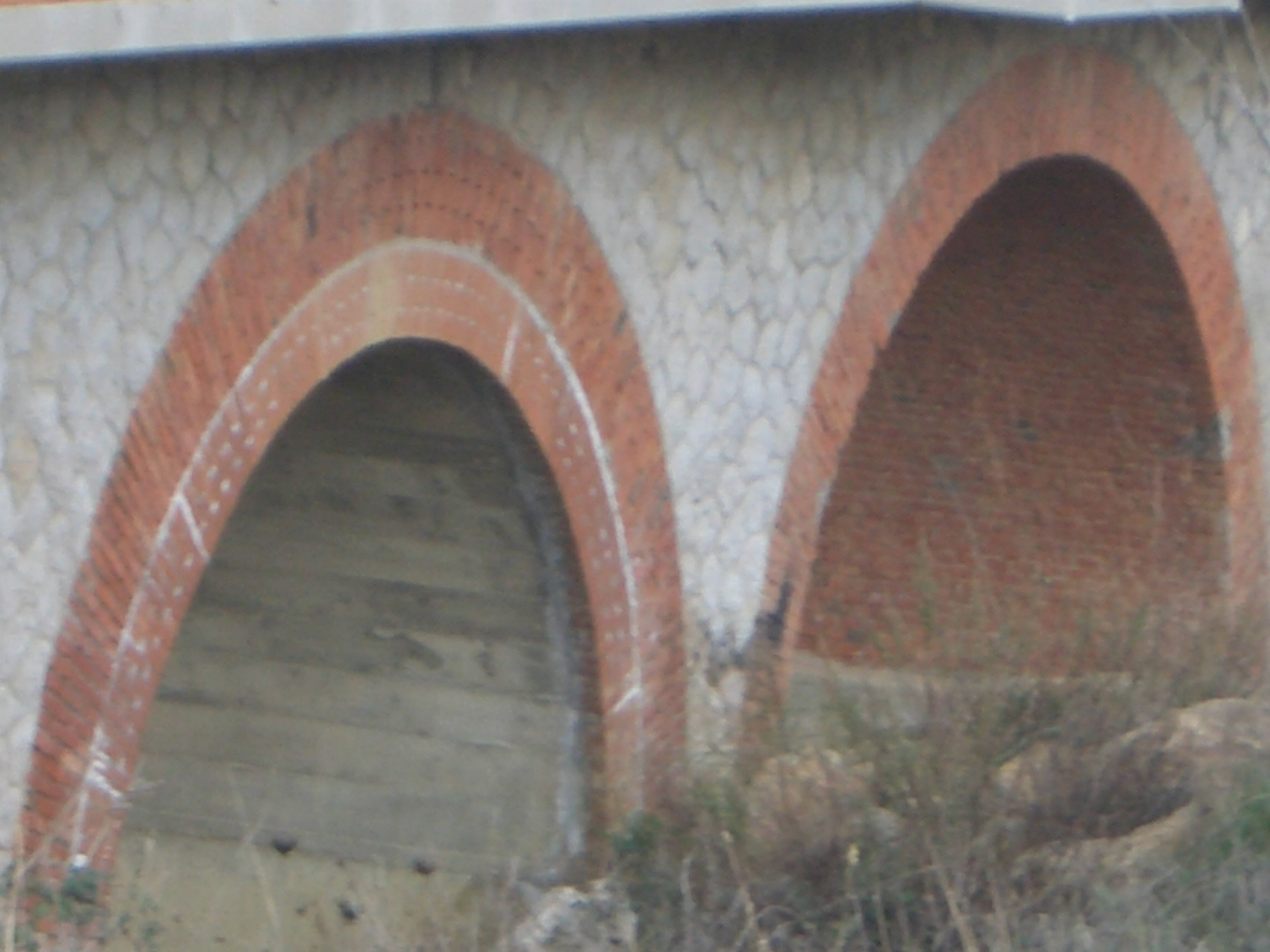 Particolare degli archi del viadotto Melledra sulla ferrovia Civitavecchia-Orte